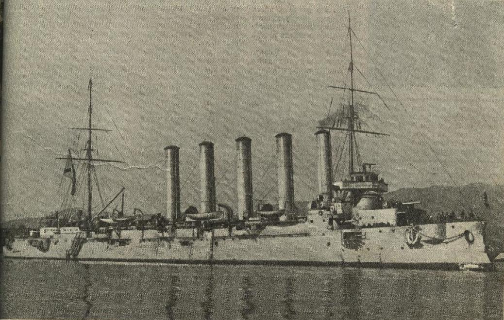 Фото крейсера "Аскольд" в журнале "Нива"